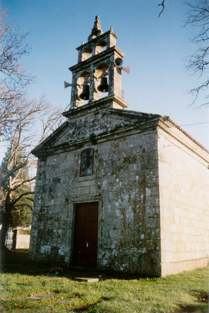 A Estrada - Galicia - Spain